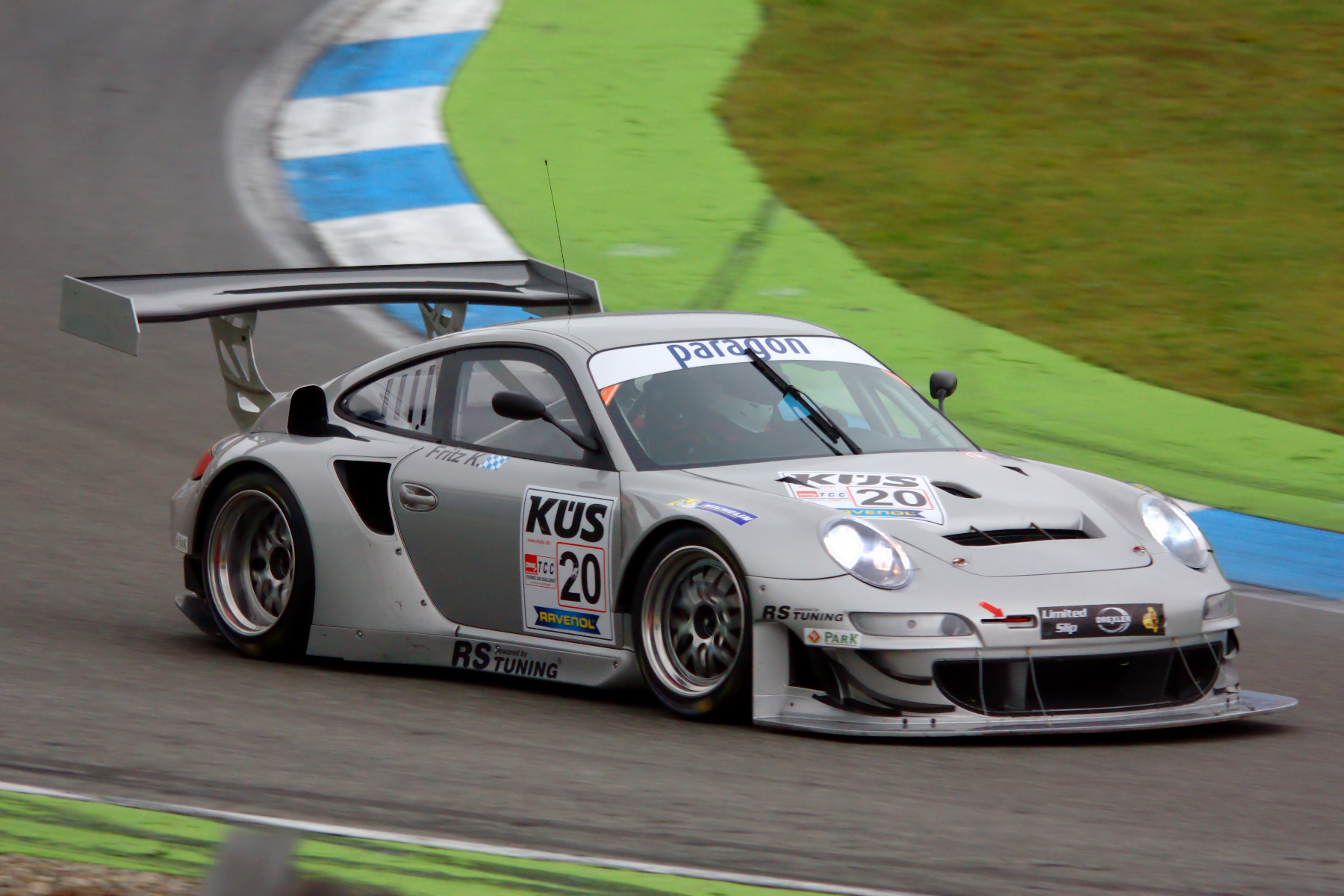 Fritz Kreuzpointer beim Rheintal Rennen der DMV Touring Car Challenge 2014